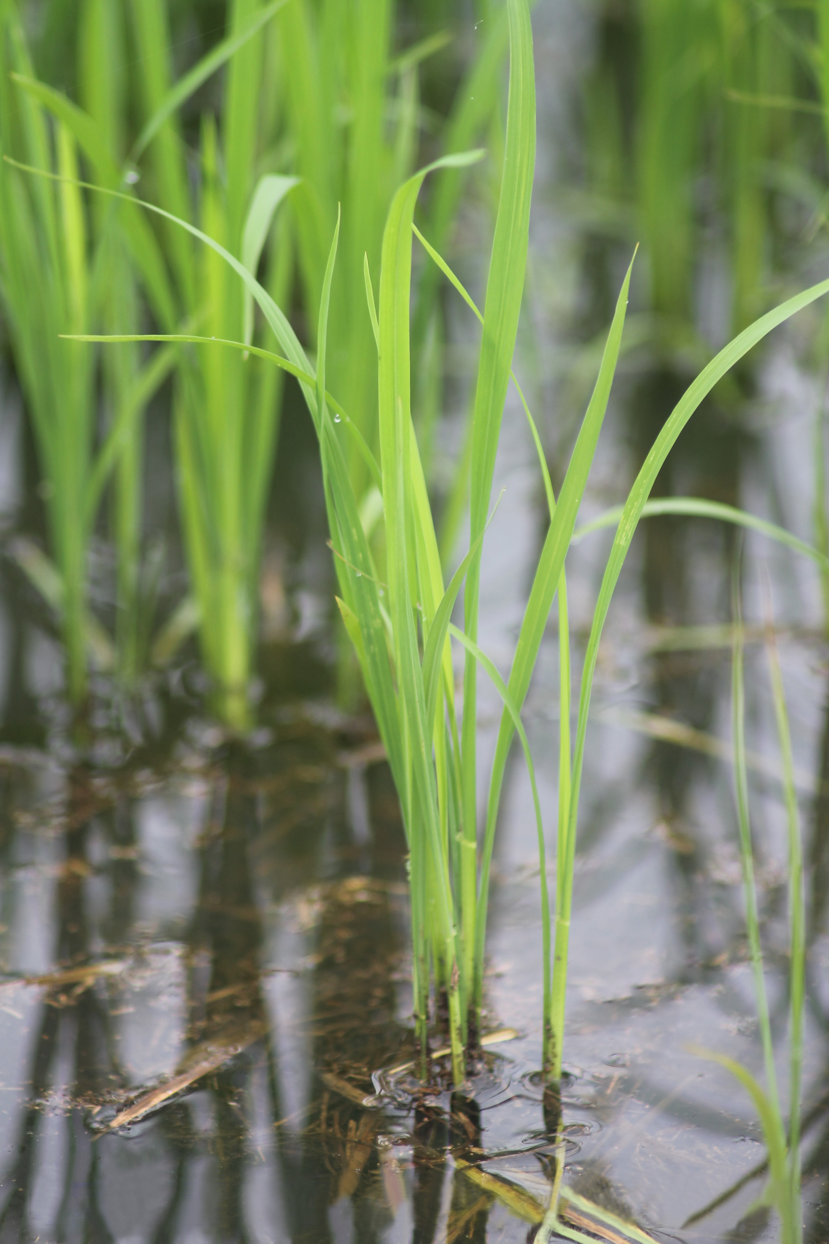 Varieti MR219 yang ditanam di Jelapang Padi daerah Kerian.